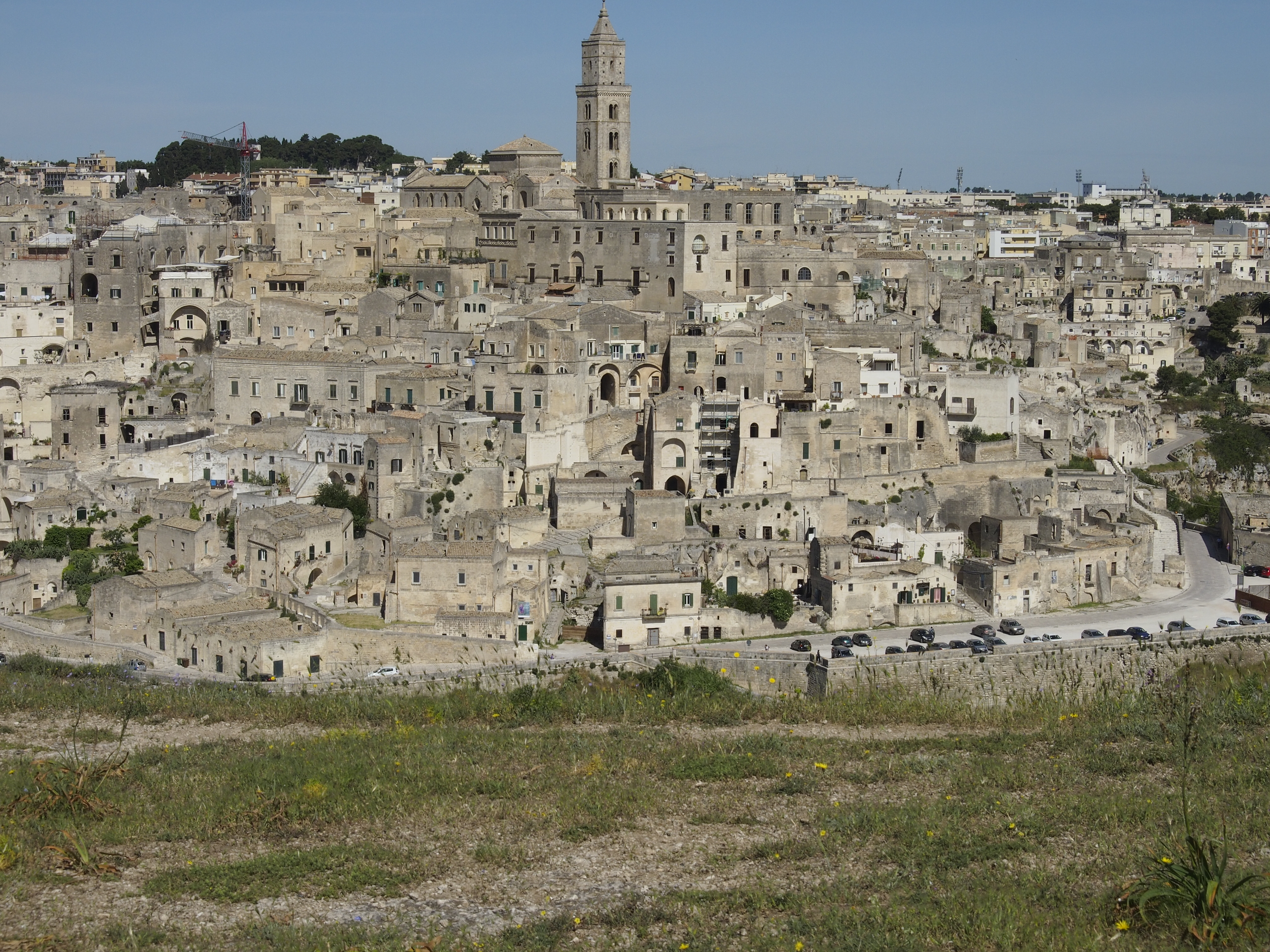 Die Sassi von Matera (Höhlenwohnungen)